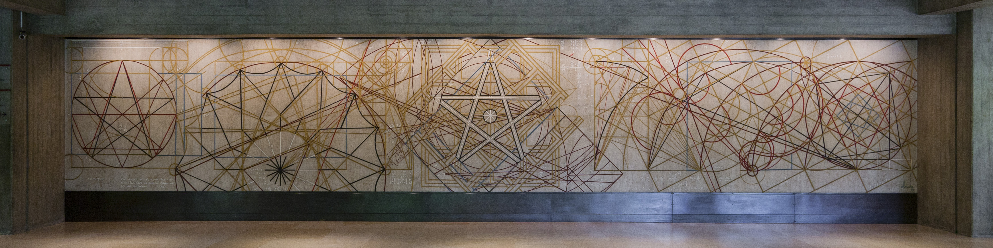 Almada Negreiros, Começar, 1968-69, átrio de entrada, Fundação Calouste Gulbenkian, Lisboa